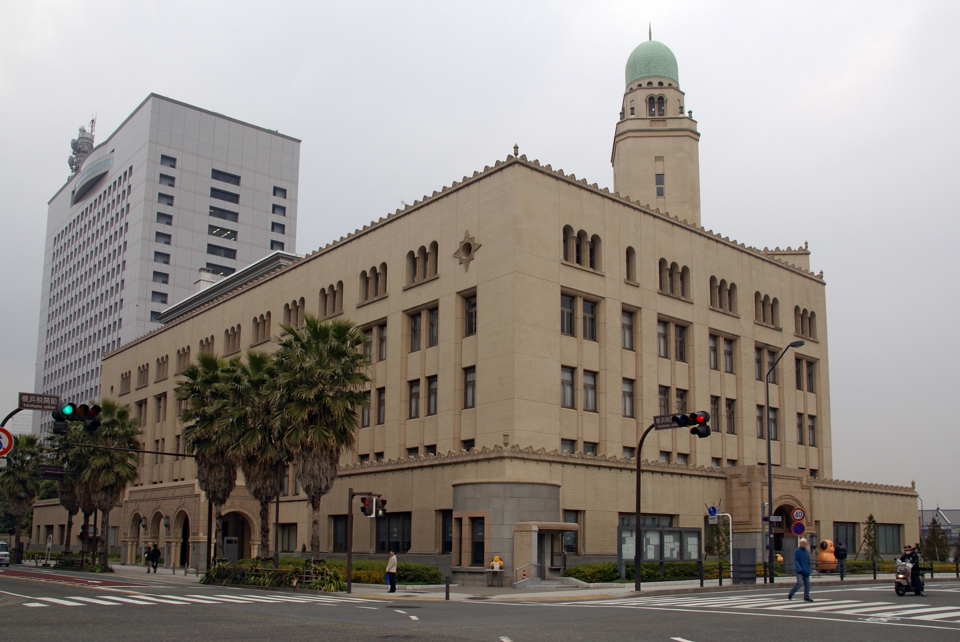 Yokohama Customs in Yokohama, Japan